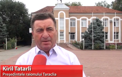 Kiril Tatarlî